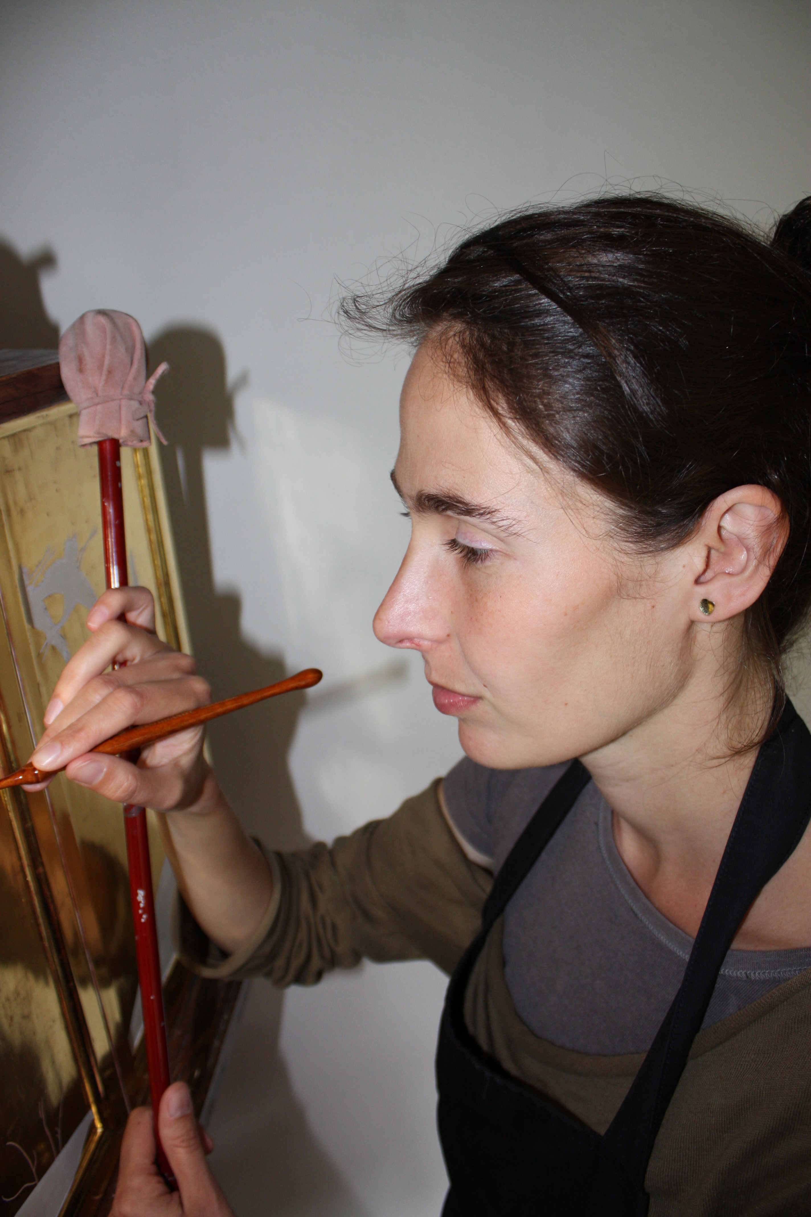 de foto is genomen in het atelier van de kunstenaar